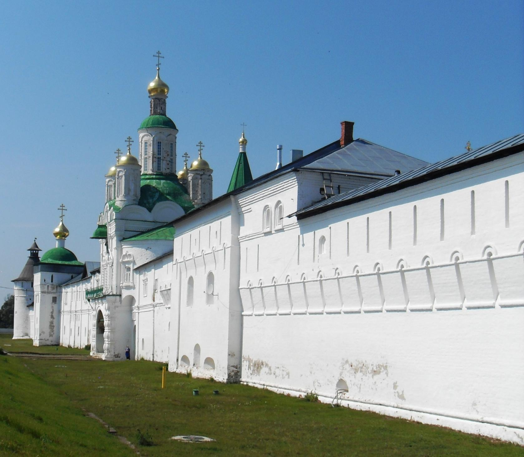 Стены монастыря